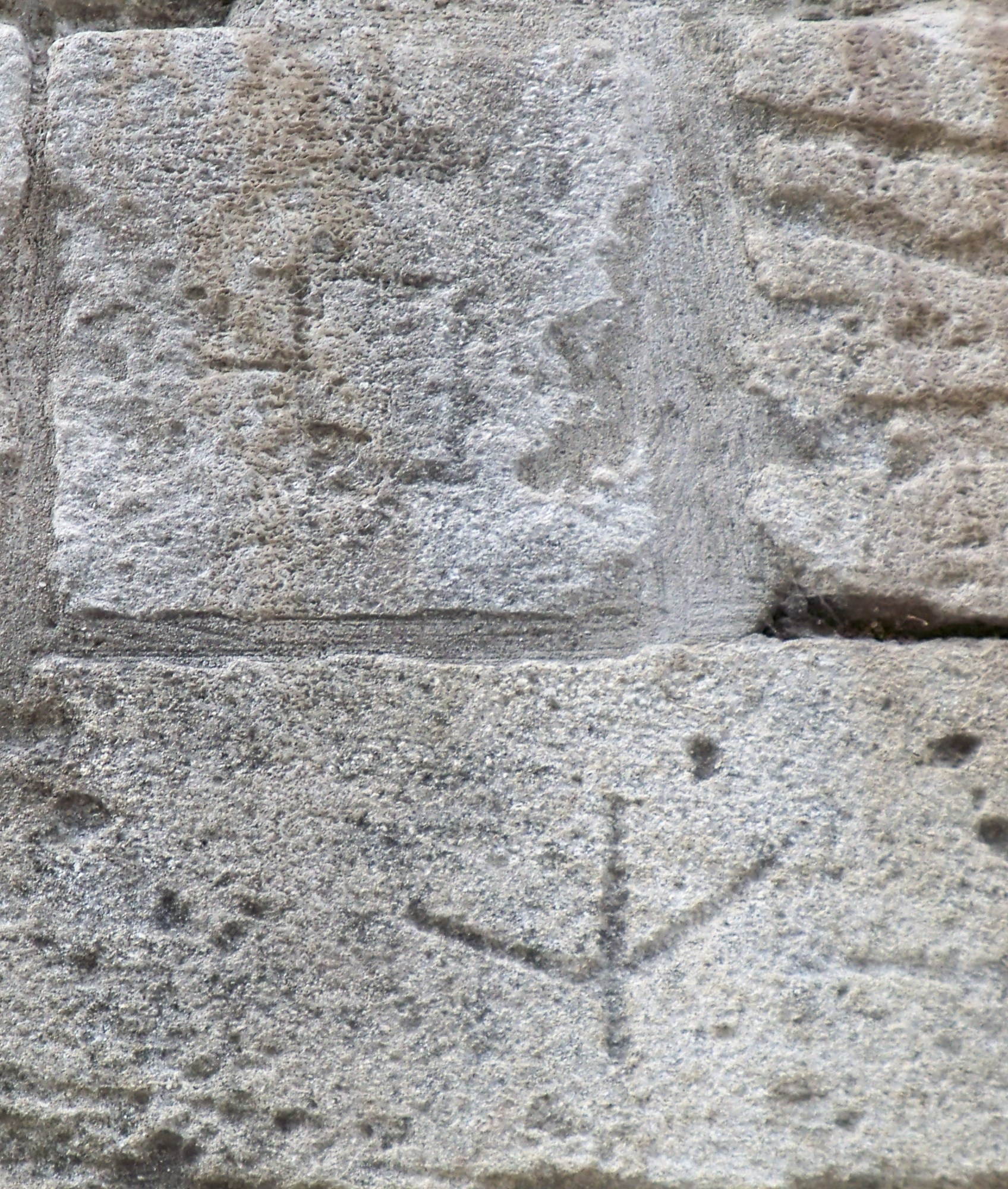 marque de tacherons sur les remparts d'Avignon (84)